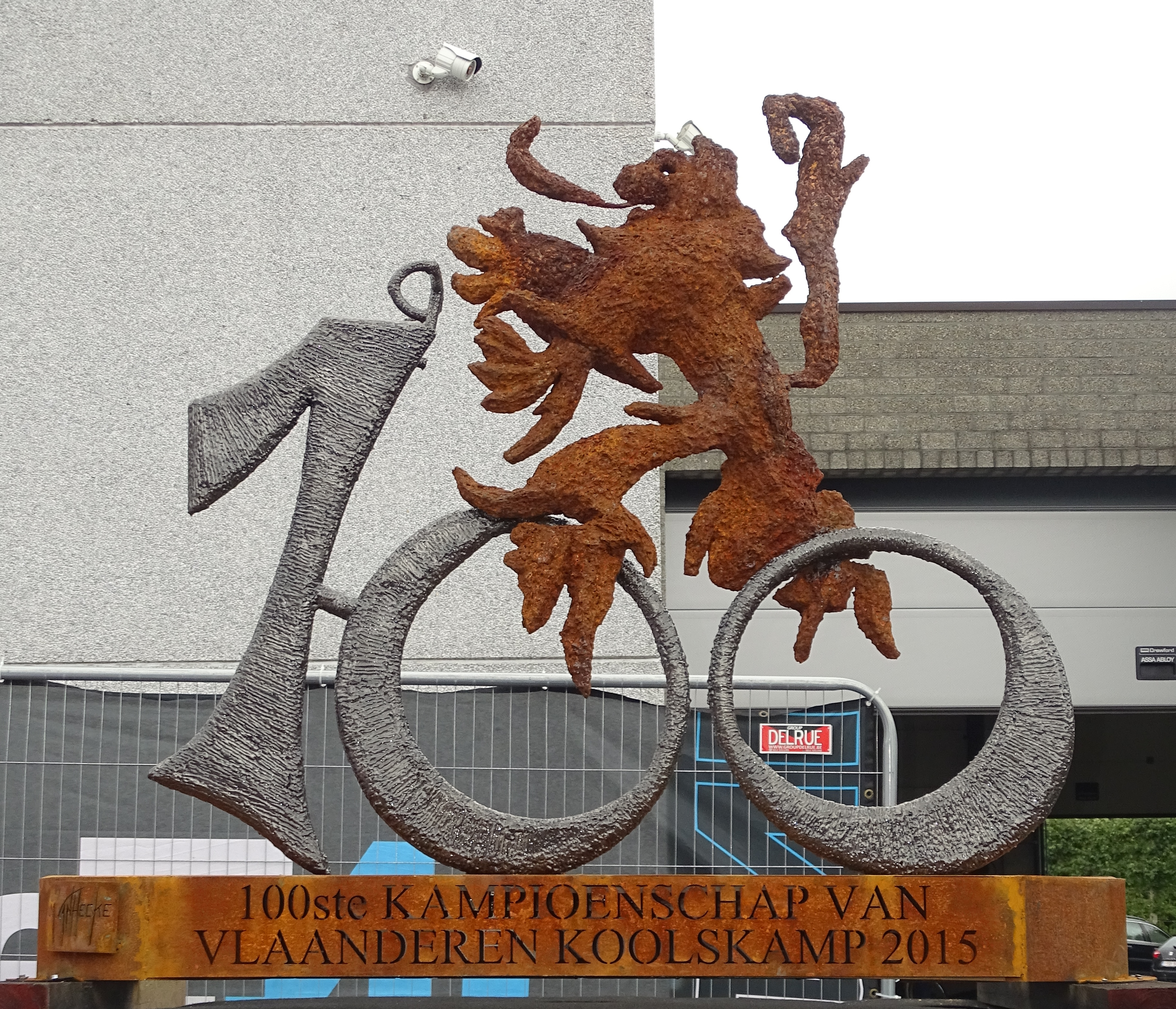 Reportage réalisé le vendredi 18 septembre à l'occasion de l'arrivée du Championnat des Flandres 2015 à Koolskamp (Ardooie), Belgique.